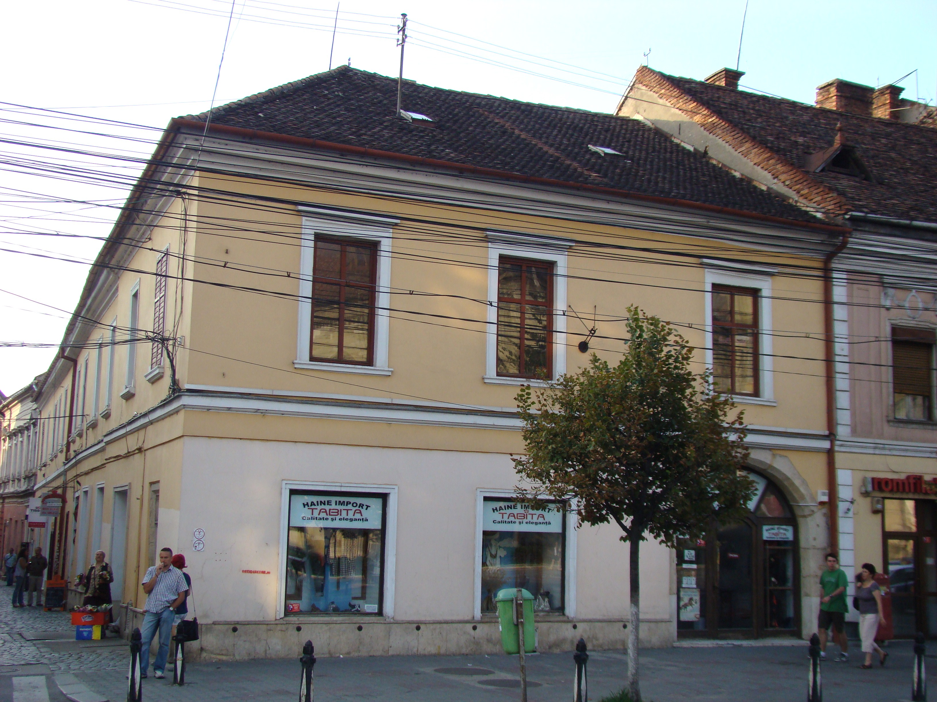 Clădire monument istoric, Piața Unirii, nr.18